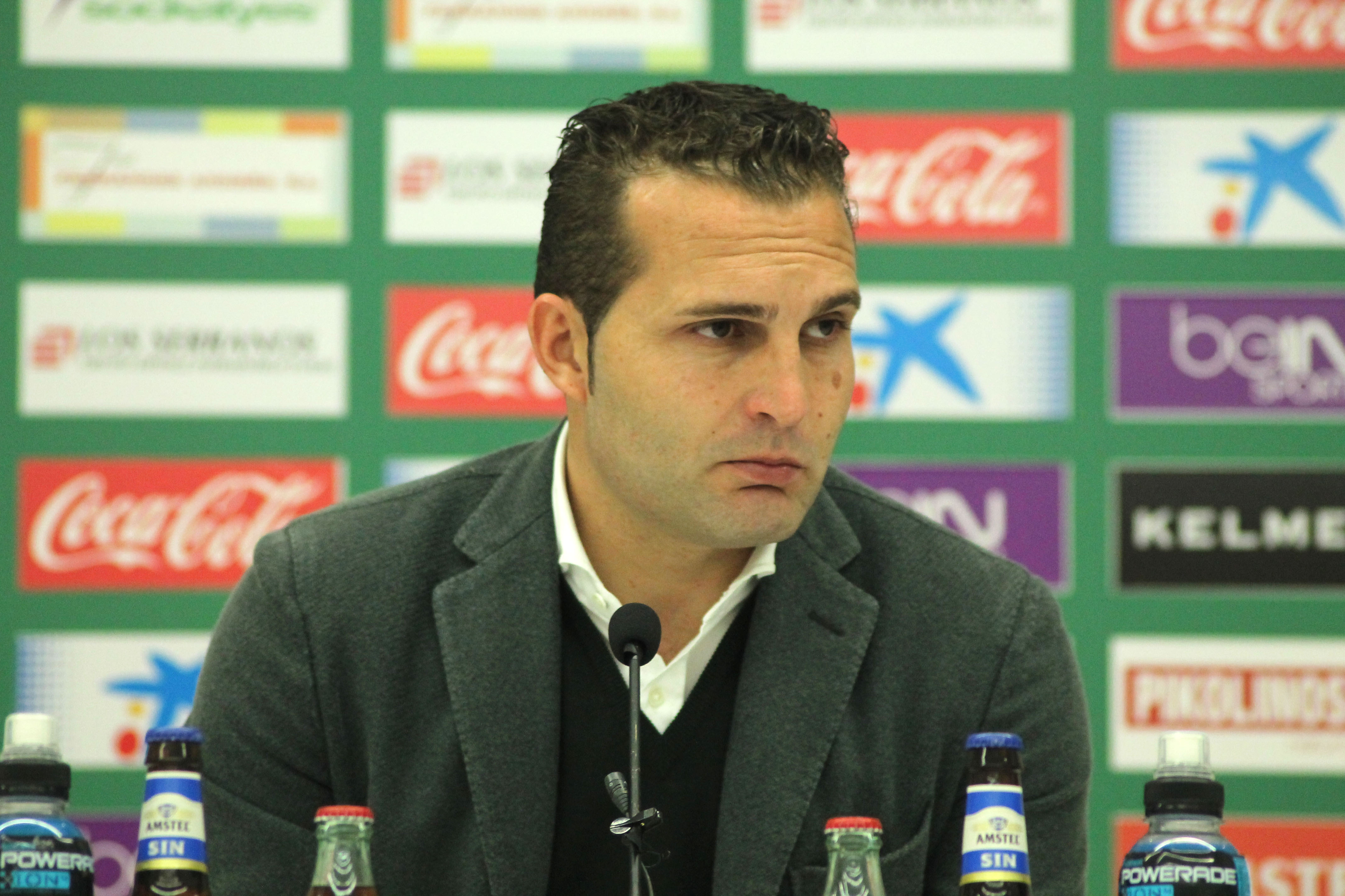 Elche vs Mallorca